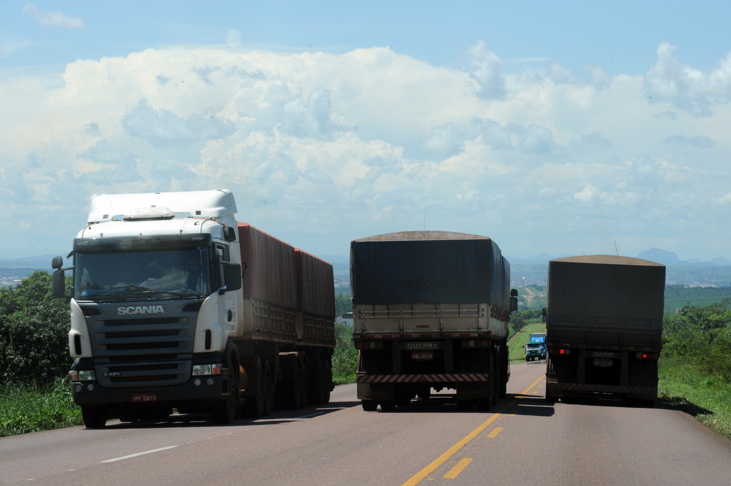 Rondonópolis (MT) - Tráfego de caminhões na BR-163, que dá acesso ao município mato-grossense. Na época de colheita, eles transportam os produtos agrícolas para outras regiões e alguns portos